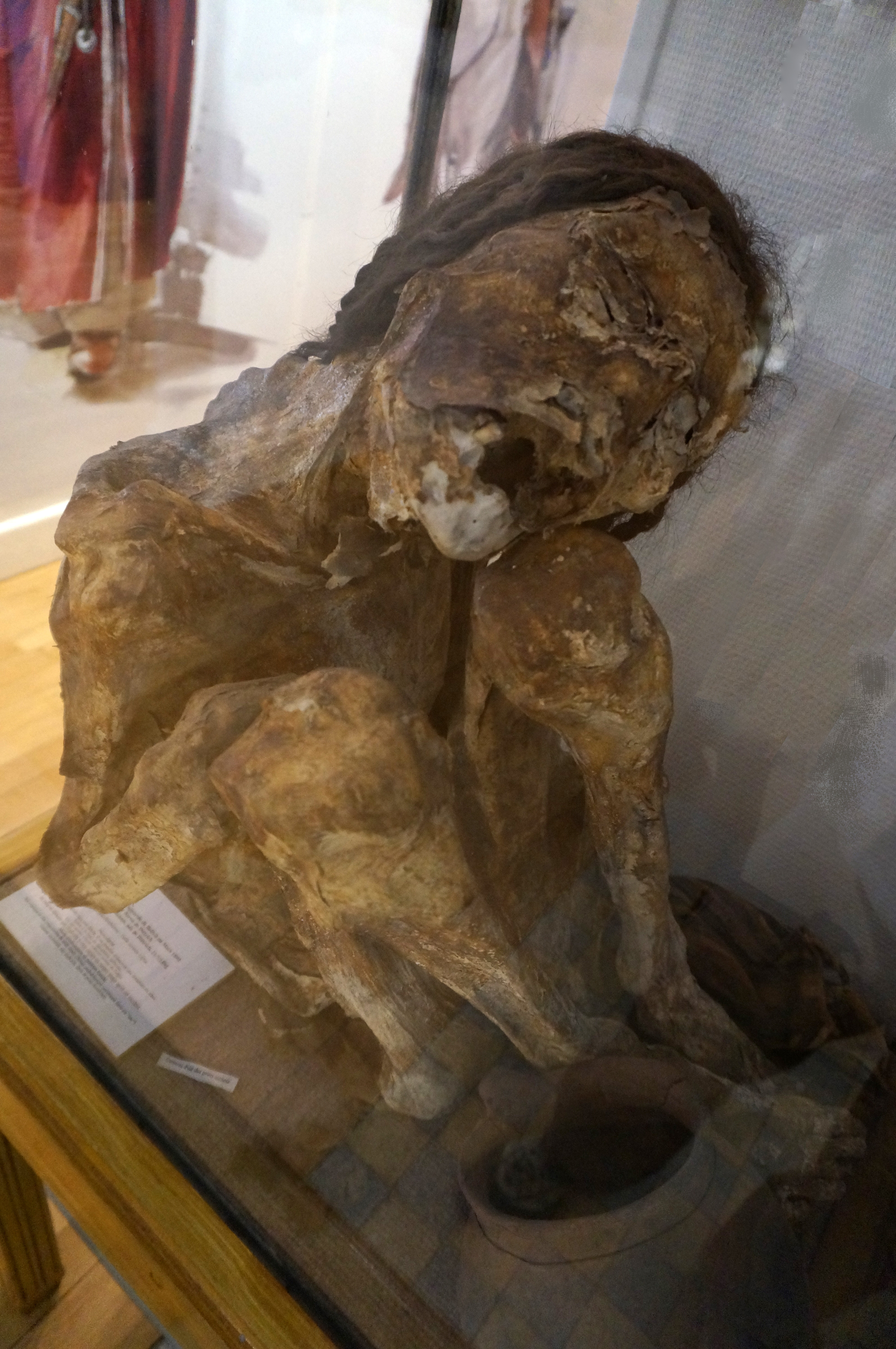 Mommie pré colombienne ramenée en 18892 par le baron de Diétrich en COlombie.